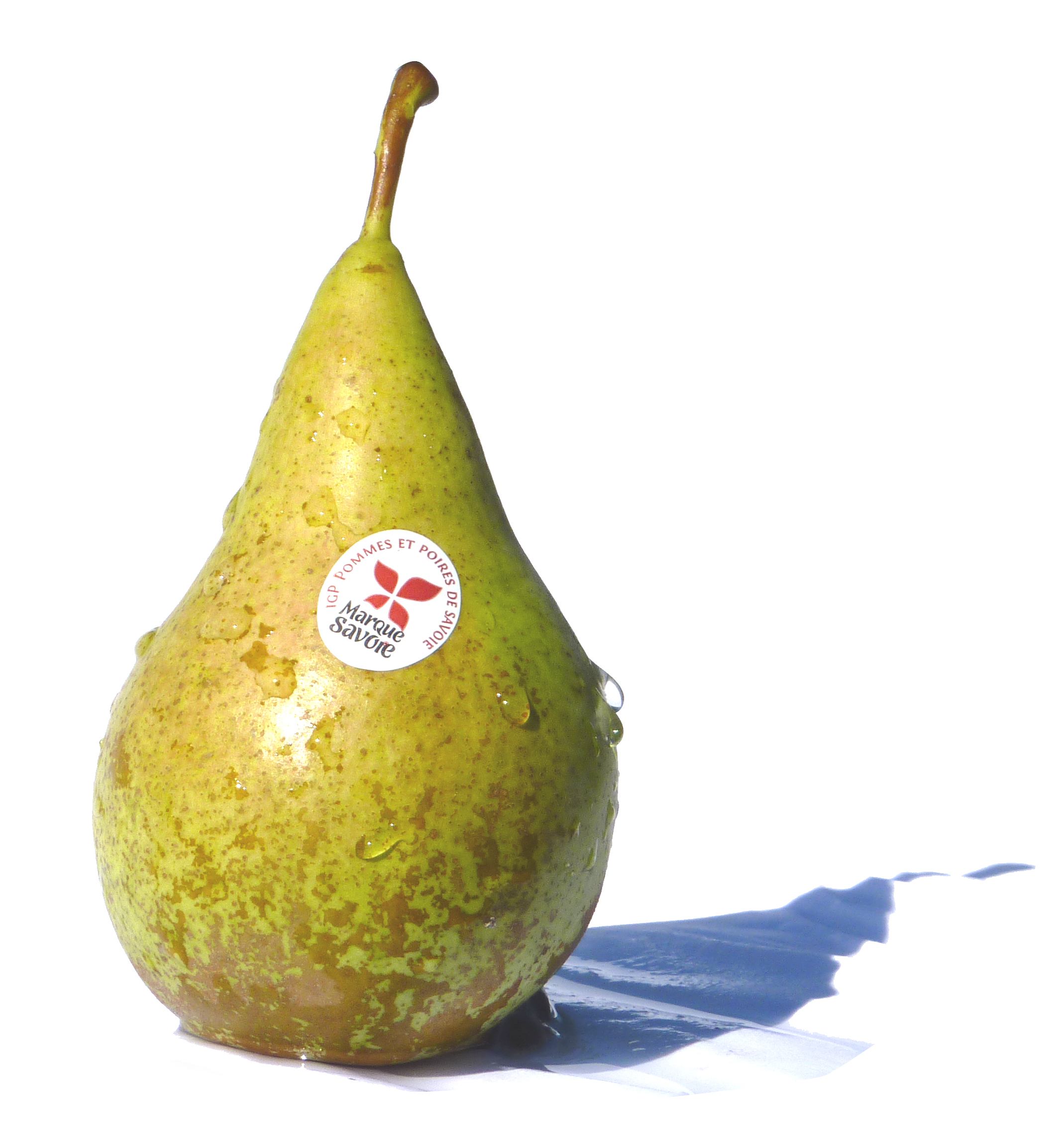 Poire Conférence Marque Savoie Thomas LE PRINCE